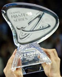 Il s'agit du trophée d'un tournoi de tennis.